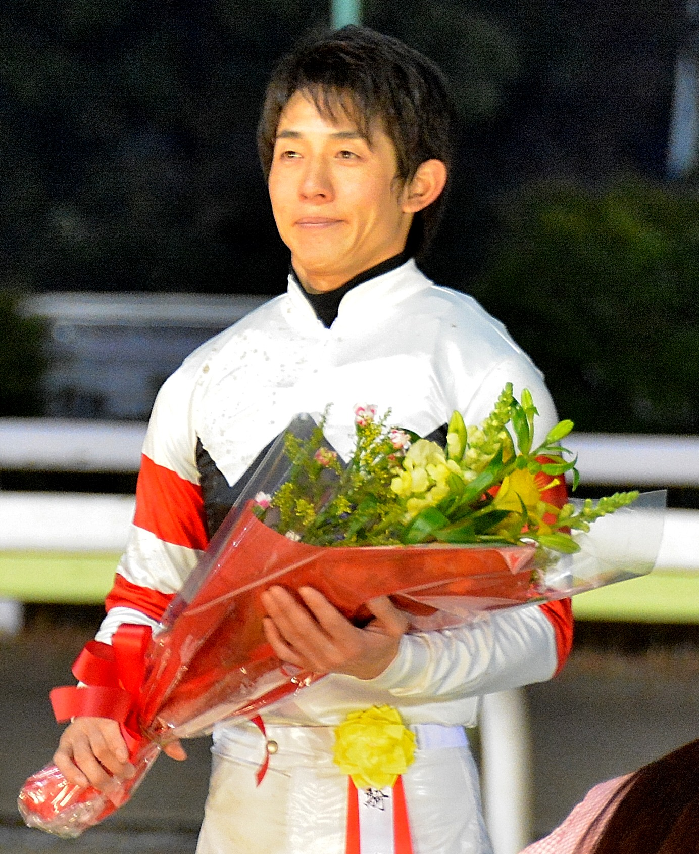 2014年12月29日に大井競馬場の第10競走で行われた「第60回東京大賞典」で、優勝したホッコータルマエに騎乗した幸英明騎手が表彰されているところを、観客席から撮影したもの。（参考： ）